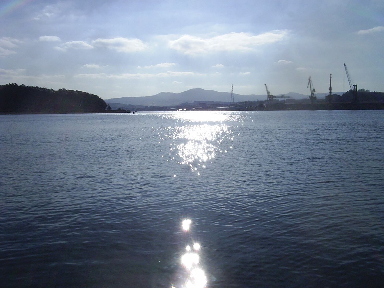 Foto desde el pantalán de Zelúan